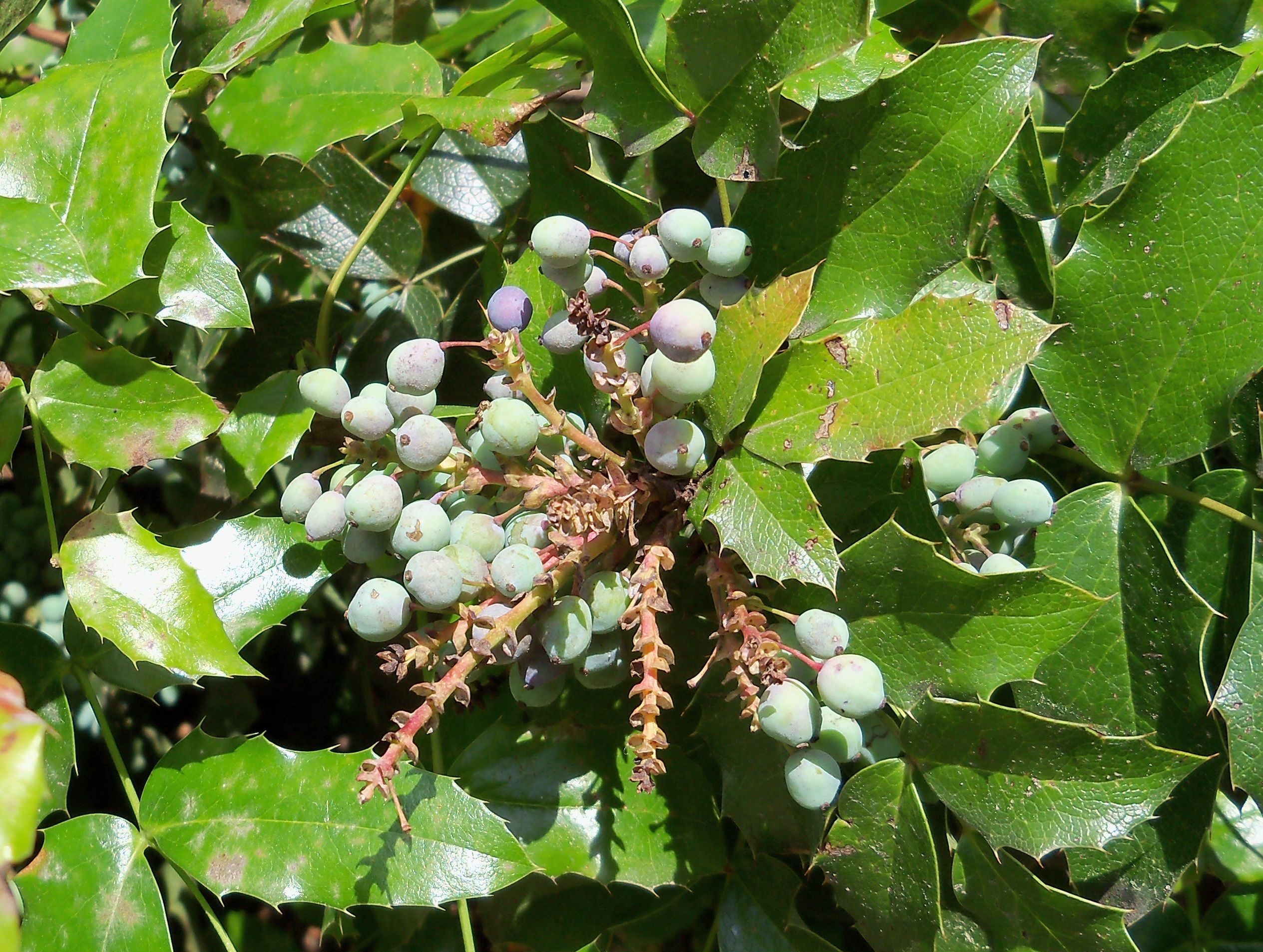 Berberis aquifolium (Uva de Oregón) : Frutos, todavía inmaduros - «Montaña de los gatos», Parque del Buen Retiro, Madrid (España).